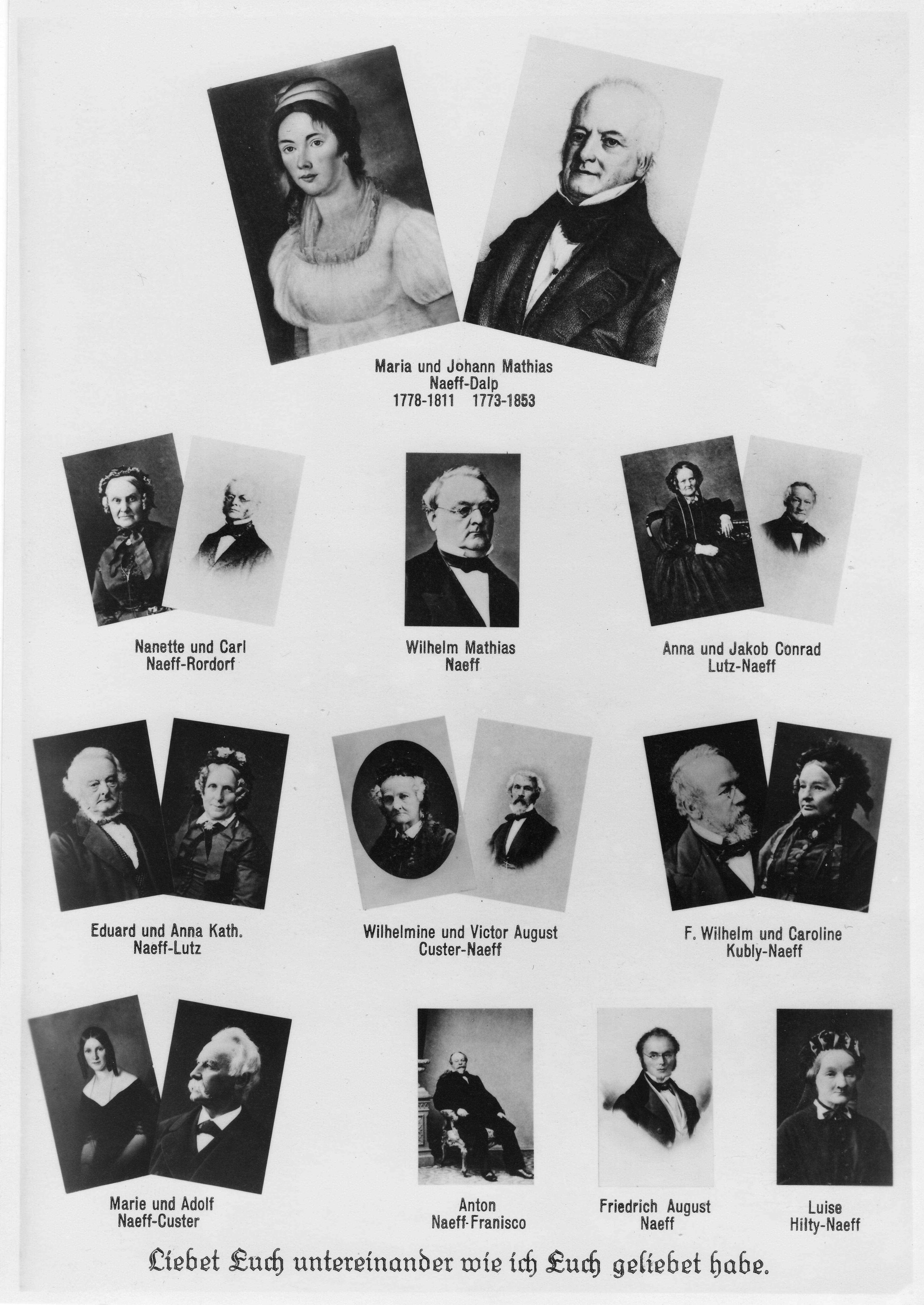 Johann Matthias und Maria Naeff-Dalp, sowie ihre 10 erwachsene Kinder mit Ehegatten — Erinnerungsblatt zum 100-Jahr-Jubiläum des Naeffen-Familienfestes (1854-1954)